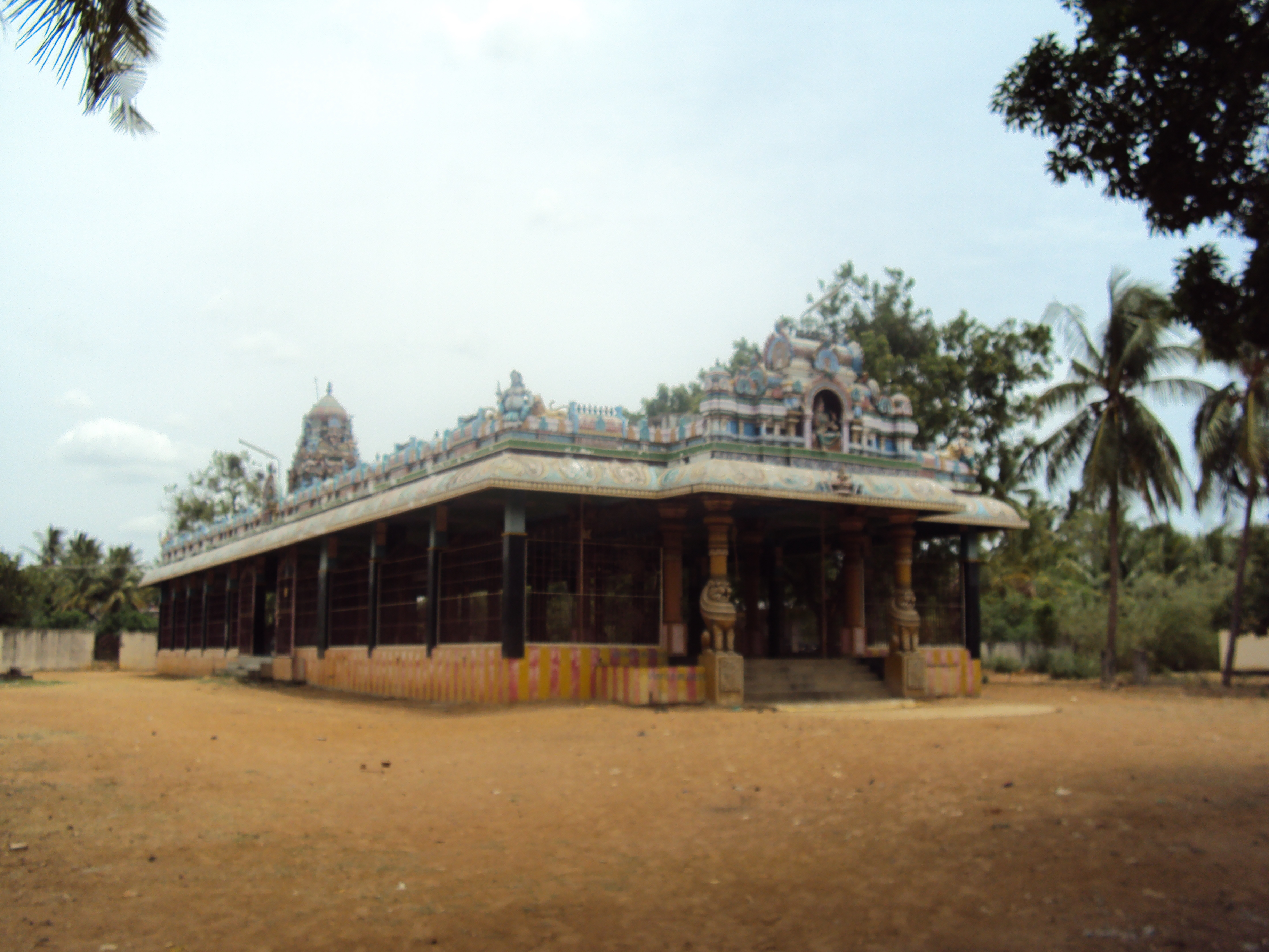 Arulmigu Kuzhanthayi Mariyamman Temple-1, This photograph was taken in the morning from South east side of the temple- அருள்மிகு குழந்ததாயி மாரியம்மன் கோவில்,உள்ளிக்கோட்டை- இந்த ஒளிப்படம் காலை நேரத்தில் கோவிலின் தென் கிழக்கு திசையில் இருந்து எடுக்கப்பட்டது